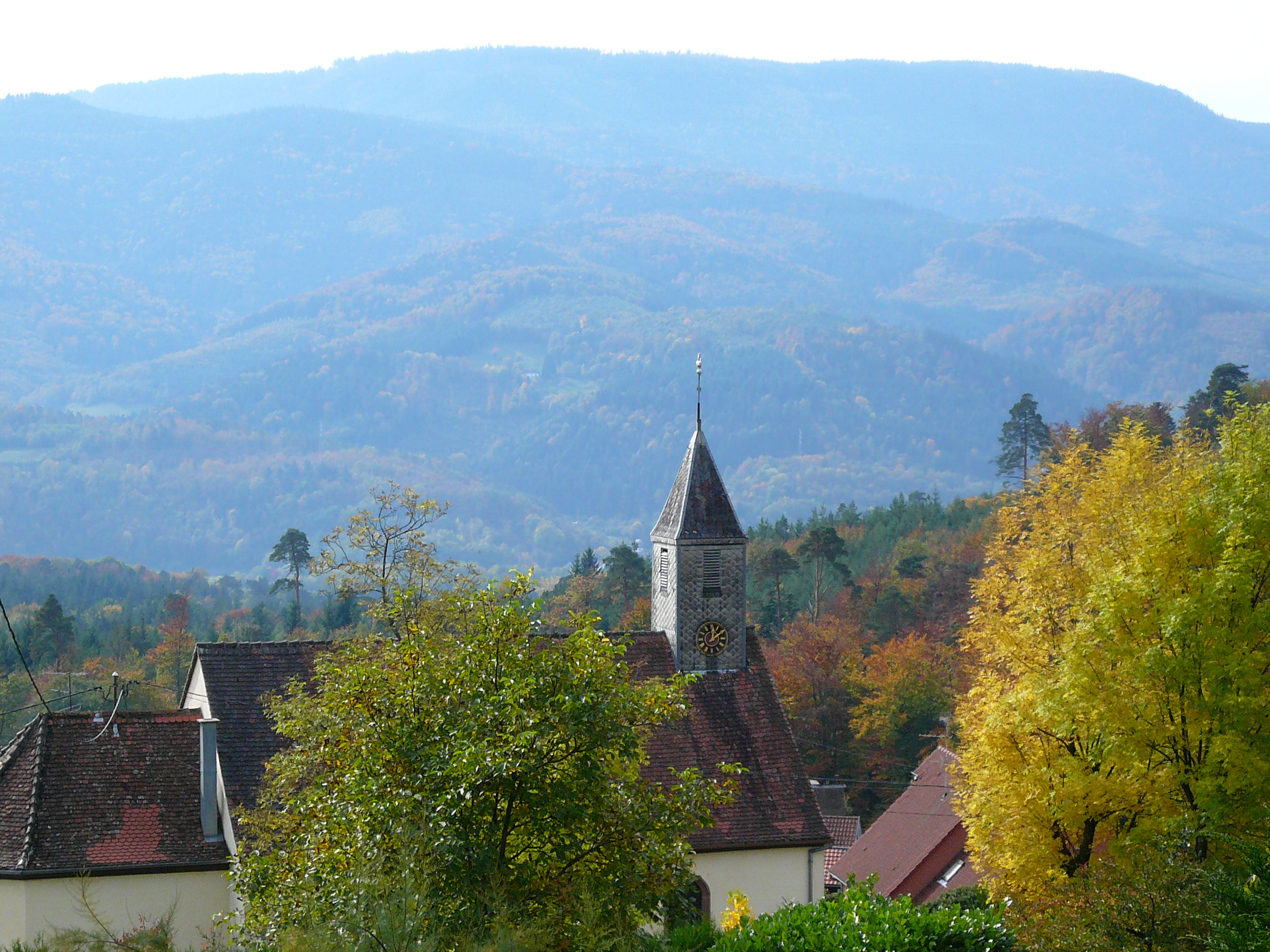 Le village de La Vancelle jouit d'un site exceptionnel sur le versant sud de la montagne.